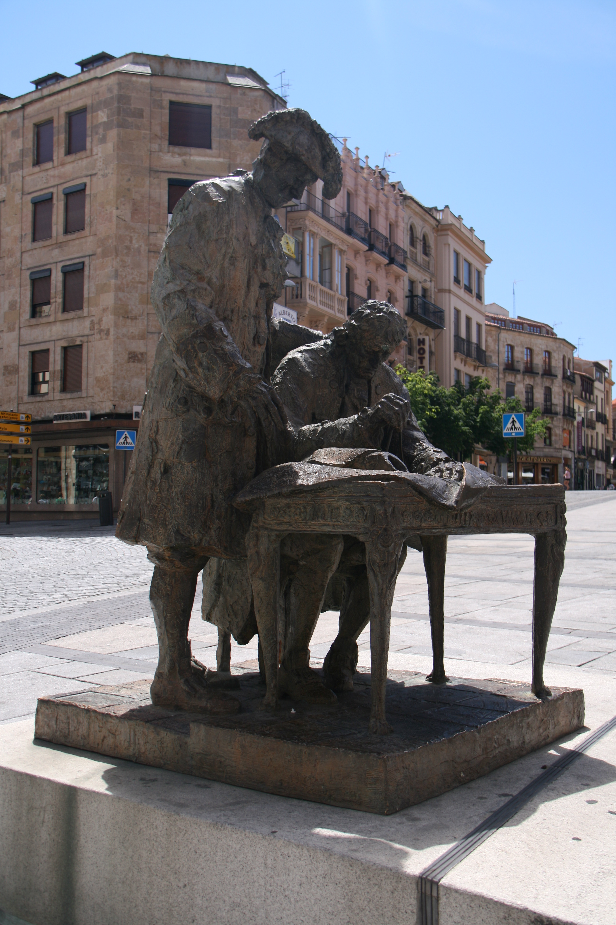 Esculturas de Rodrigo Caballero y Llanes y Alberto churriguera - Aniversrio